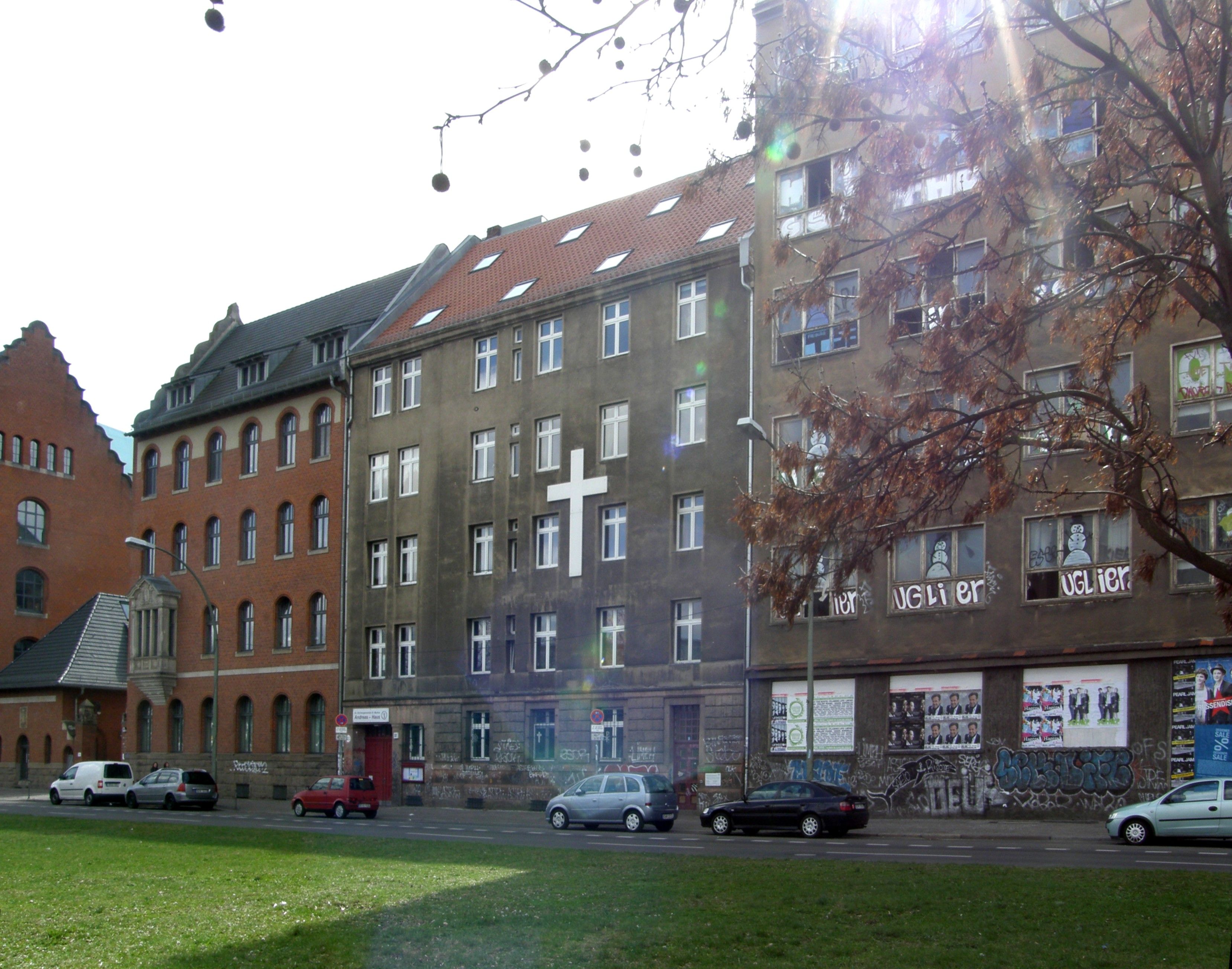 Berlin-Friedrichshain, Stralauer Platz; links: Kontorhaus , Torhaus, Magazin (Backsteingebäude); daneben Andreas-Haus und eh. Vergaser- und Filterfabrik